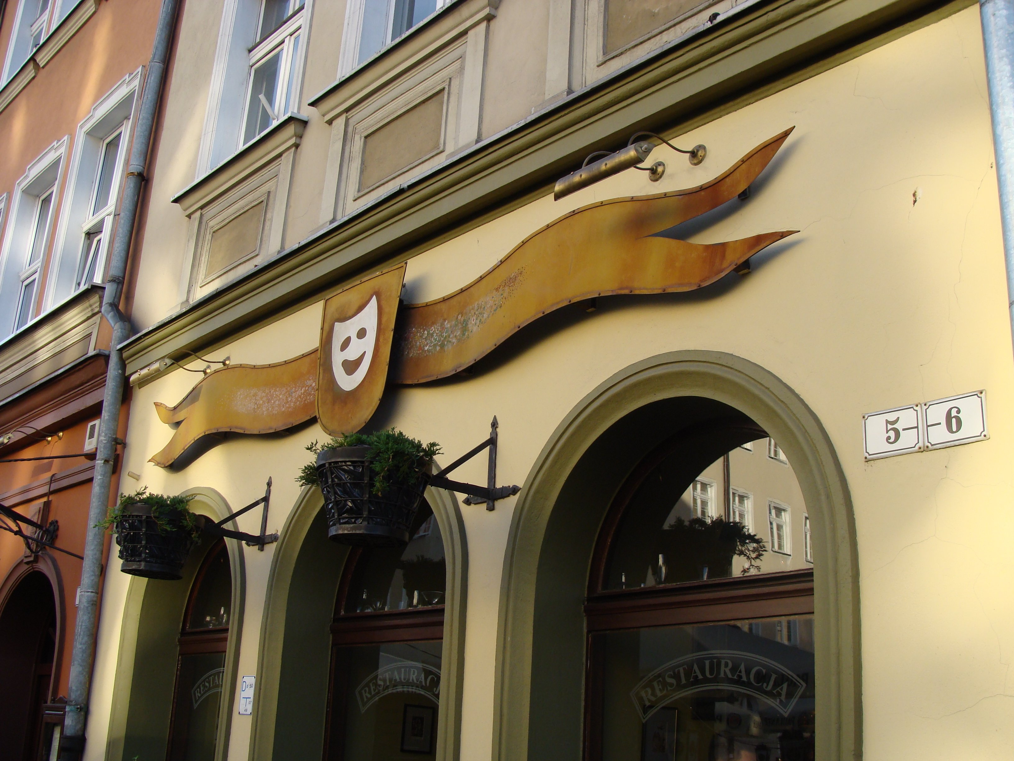 Maska z dawnego Klubu Związków Twórczych w Opolu wykonana przez Mariana Nowaka. Obecnie pub